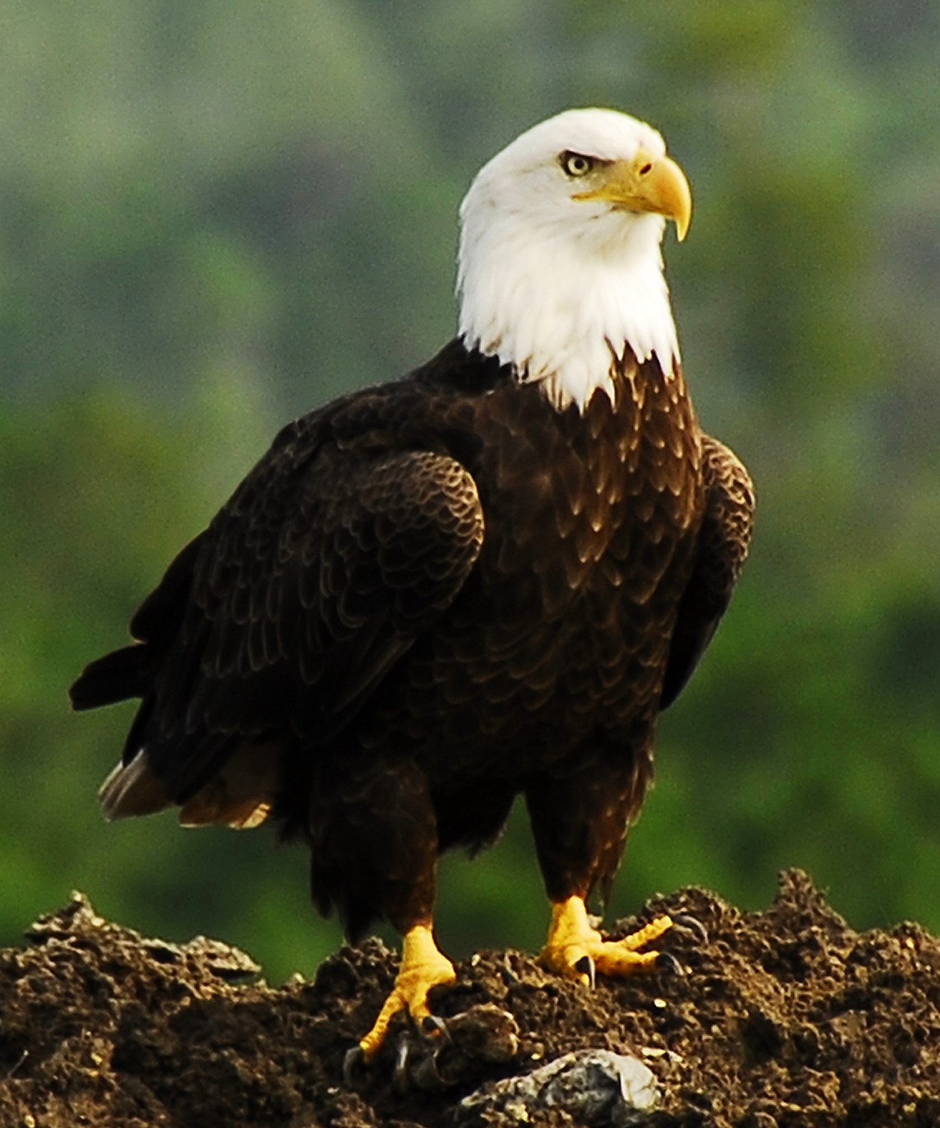 Haliaeetus leucocephalus